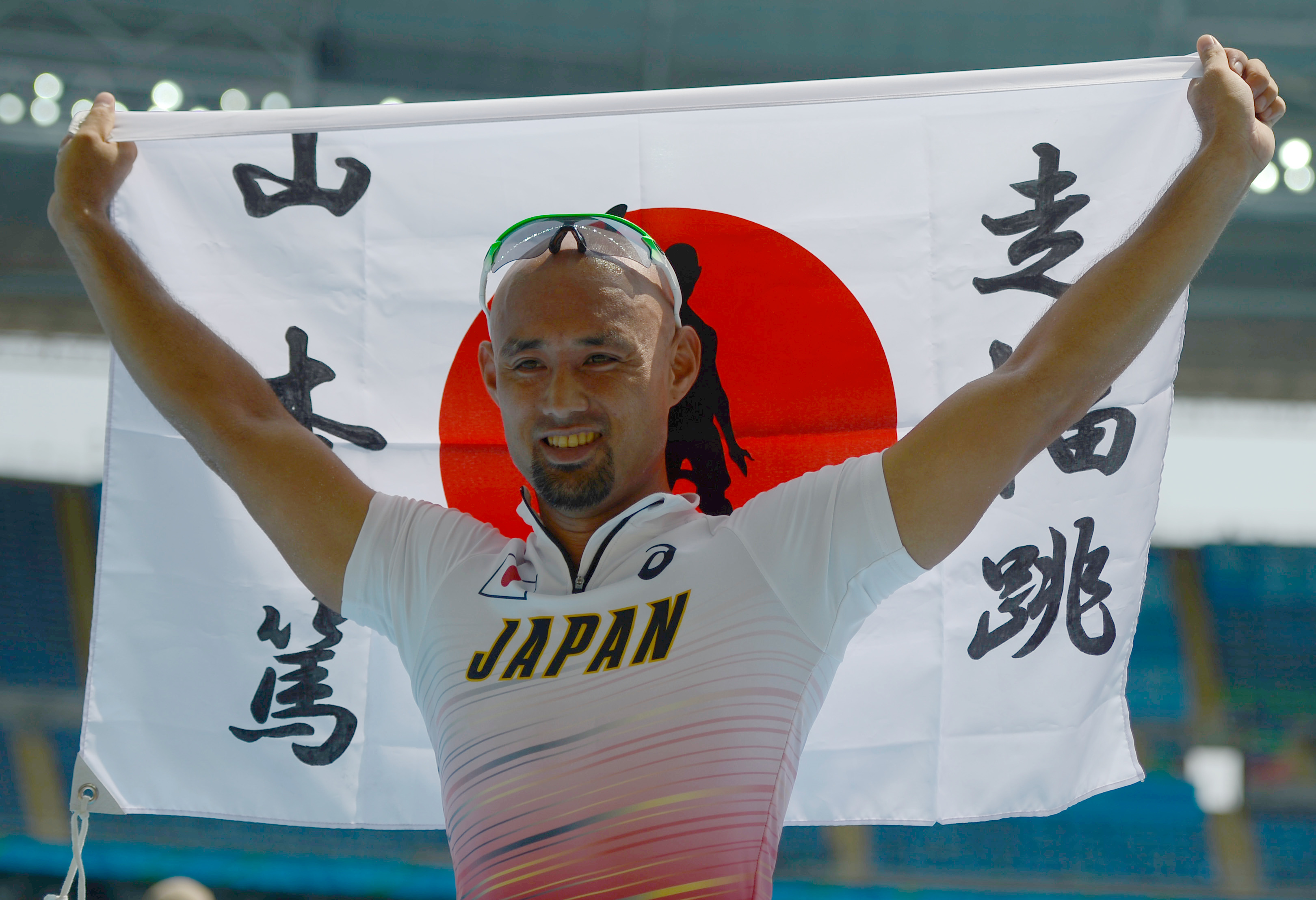 Rio de Janeiro - Atsushi Yamamoto do Japão leva prata no salto em distância T42 masculino nos Jogos Paralímpicos Rio 2016 (Fernando Frazão/Agência Brasil)